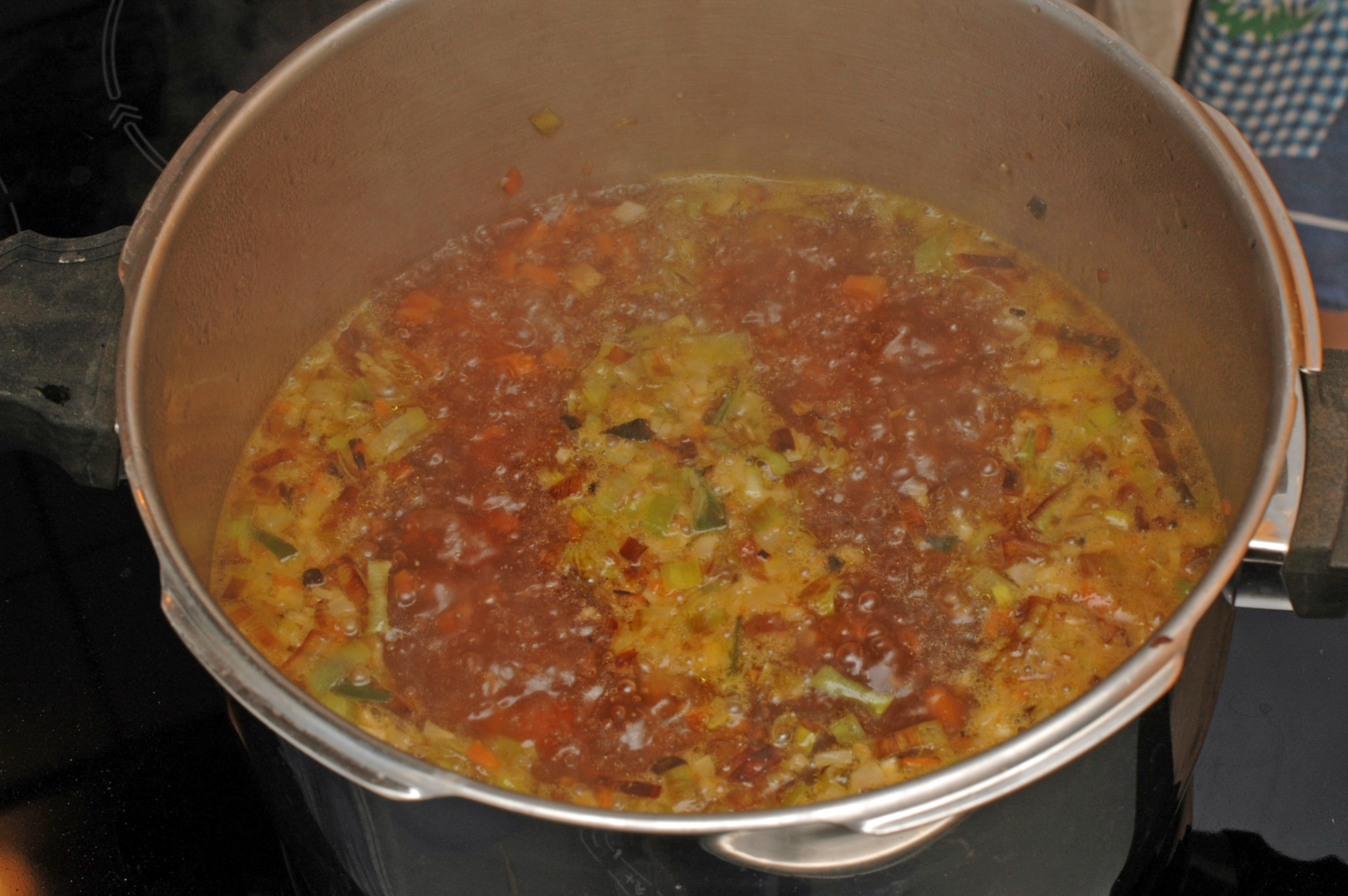 Zubereitung von Bigos: Alle Gemüse werden mit ca. 1 Liter Brühe aufgefüllt